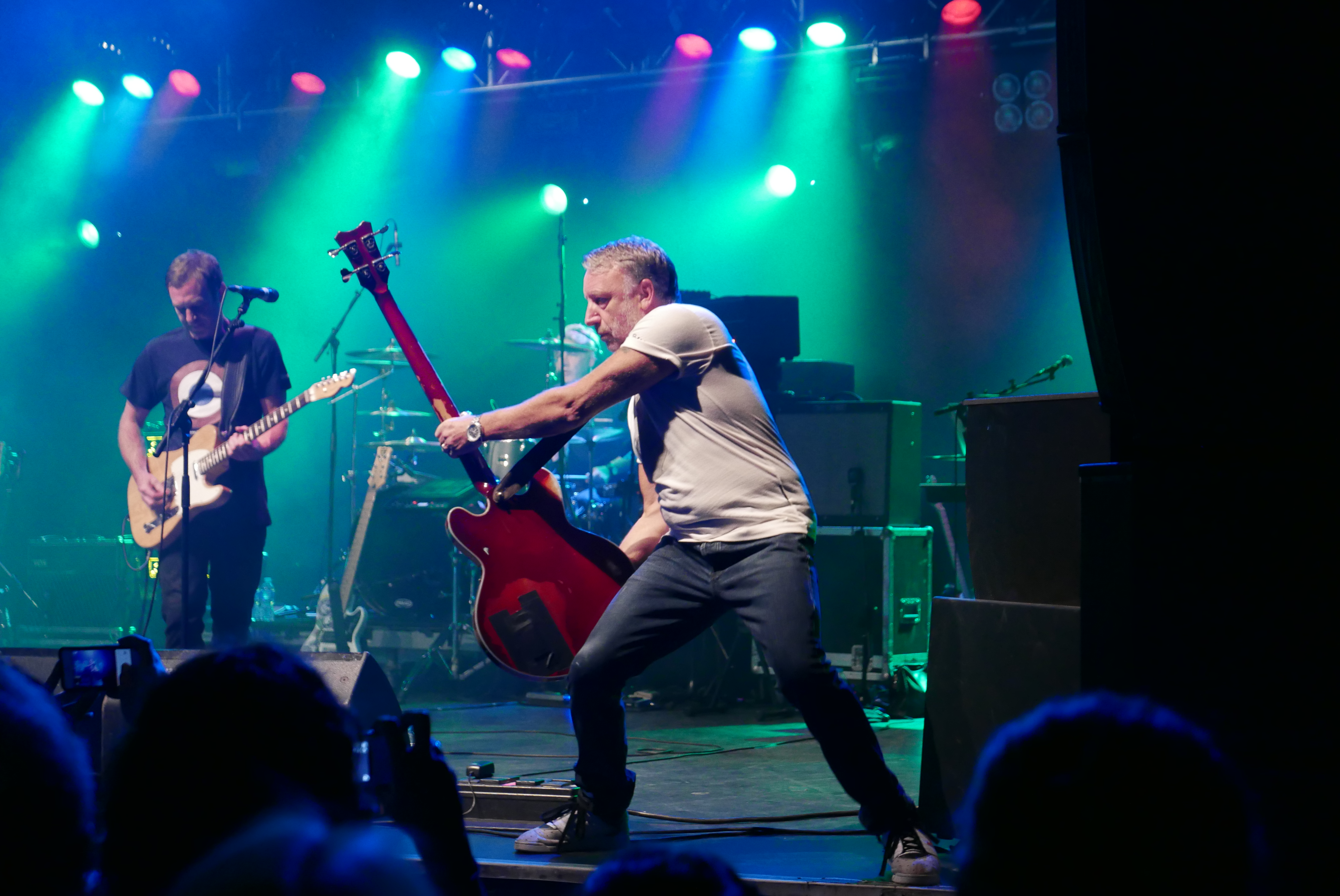 Concert du 17 septembre 2016 au O2 Forum de Londres